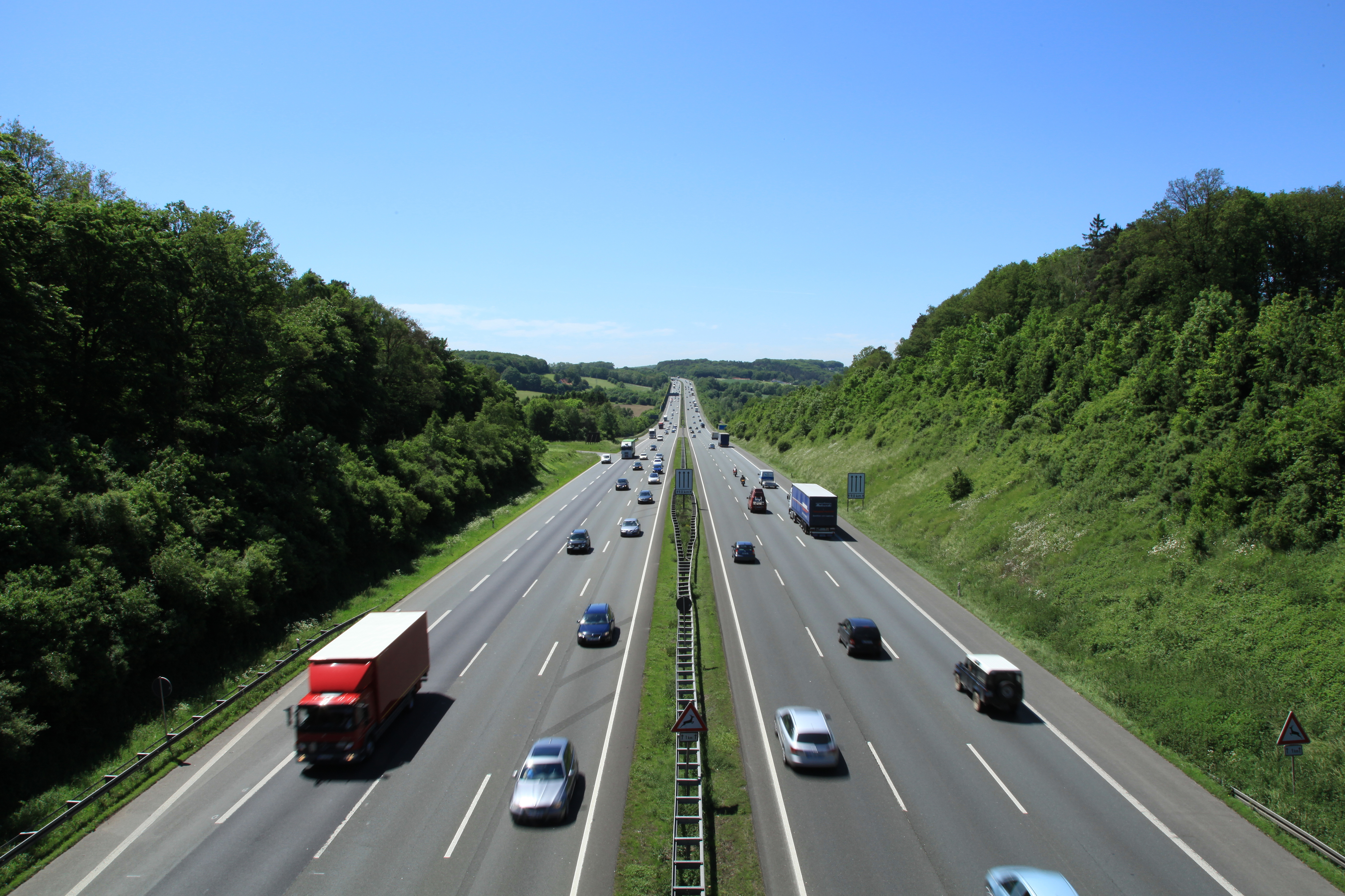 Blick von der Brücke der Eichholzstraße auf die Bundesautobahn 1 in Gevelsberg